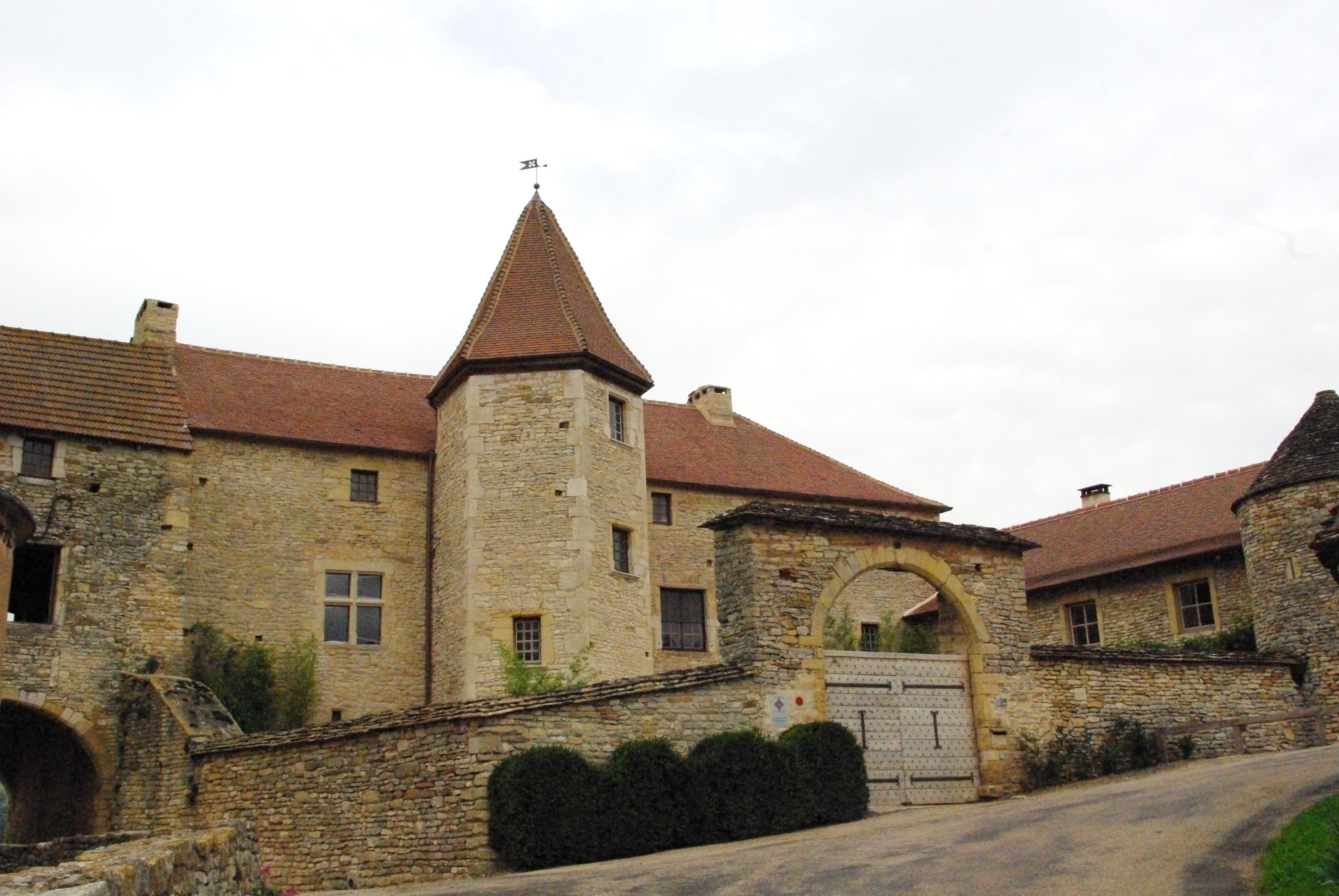 Prieuré de Blanot, Saône-et-Loire